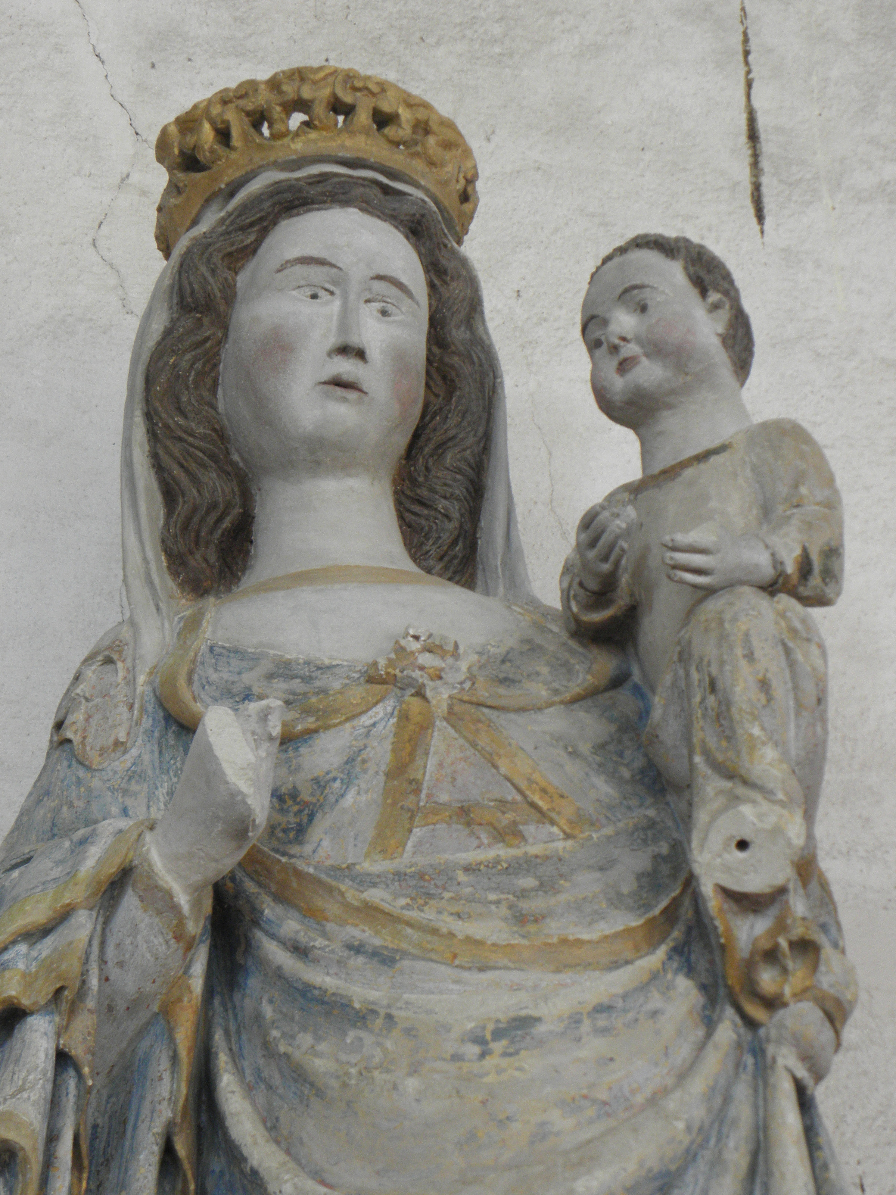 Église Saint-Jean de Béré à Châteaubriant (44). Intérieur. Statue de la Vierge à l'Enfant. Détail.